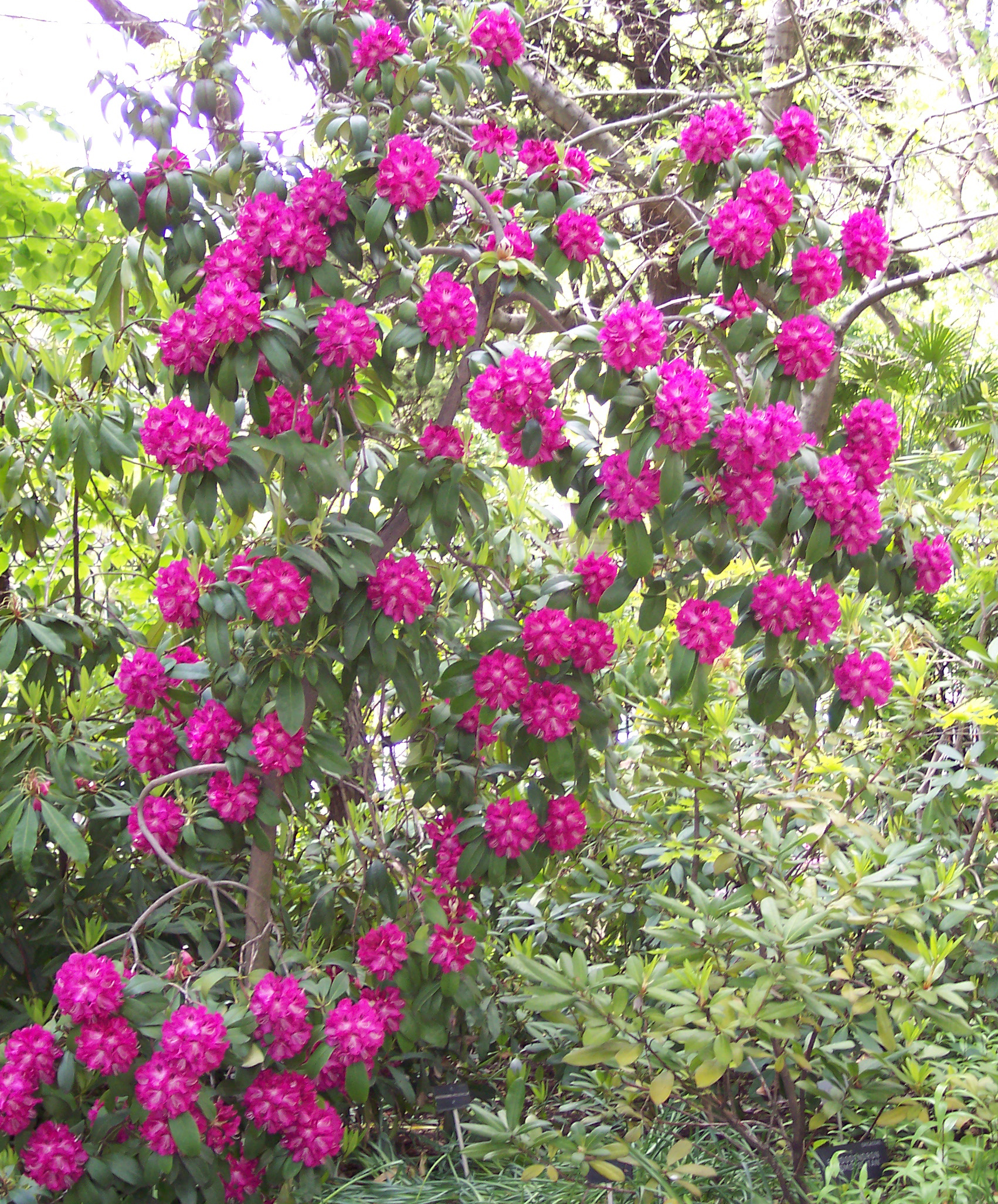 Rhododendron 'Purple Splendour'. Real Jardín Botánico de Madrid.